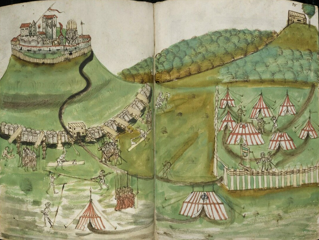 vermutlich älteste Darstellung der Burg Hohengeroldseck; während der Belagerung durch den Pfalzgrafen Philipp den Aufrichtigen im Jahre 1486